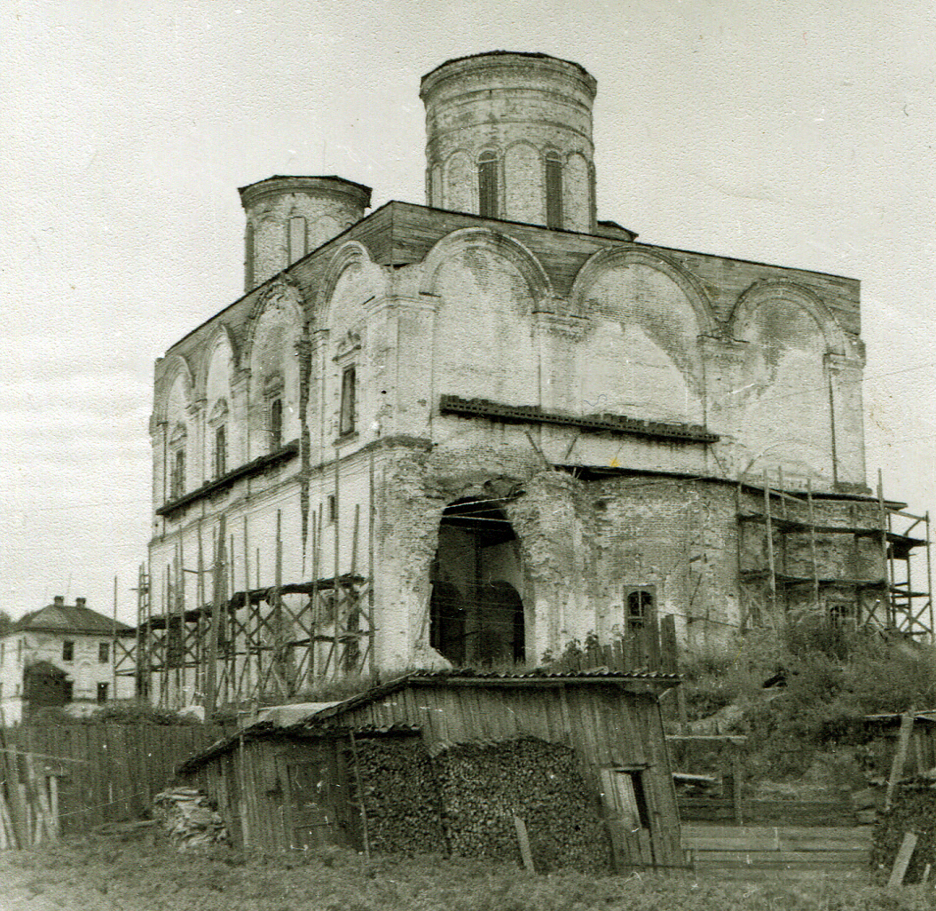 Храм в Холмогорах.На заднем плане -дом заточения